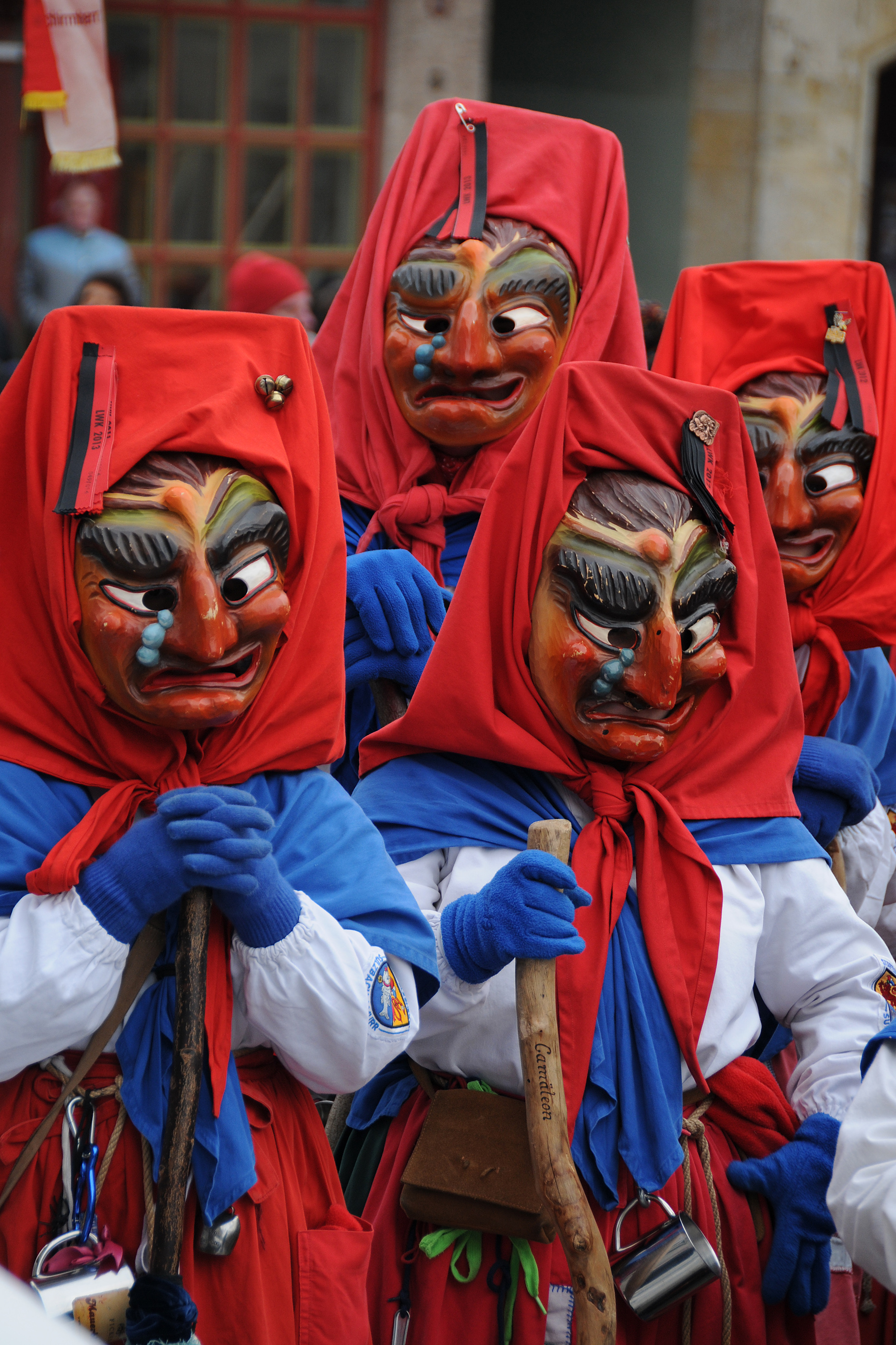 Stäffeleshexen des Sulzbacher Carnevalsvereins, Sulzbach an der Murr Veranstaltung: Rathaussturm und Narrenbaumstellen, 19. Januar 2013 - Rathausplatz Esslingen